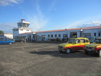 airport de Sambava